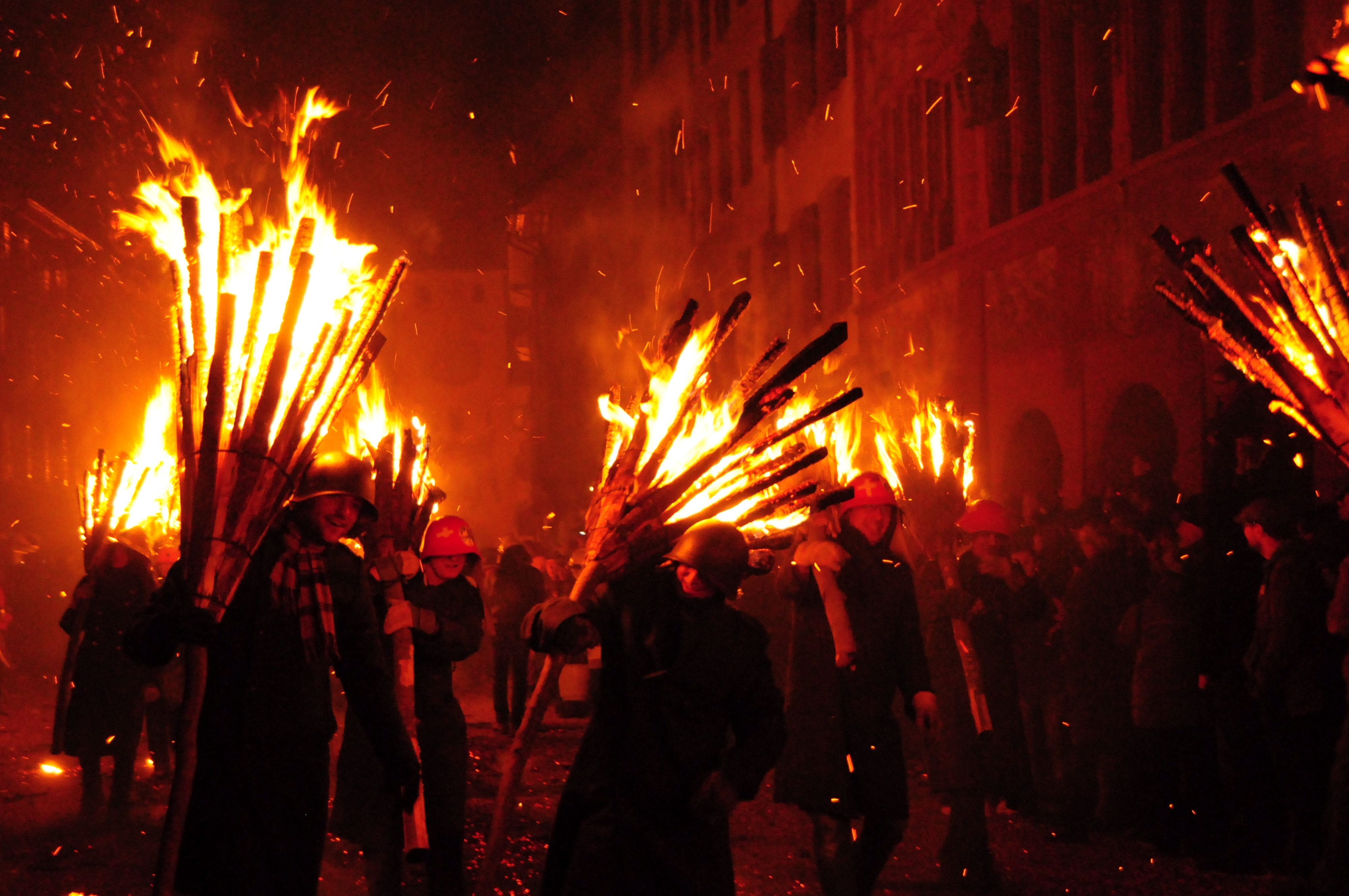 Chienbäse Umzug in Liestal